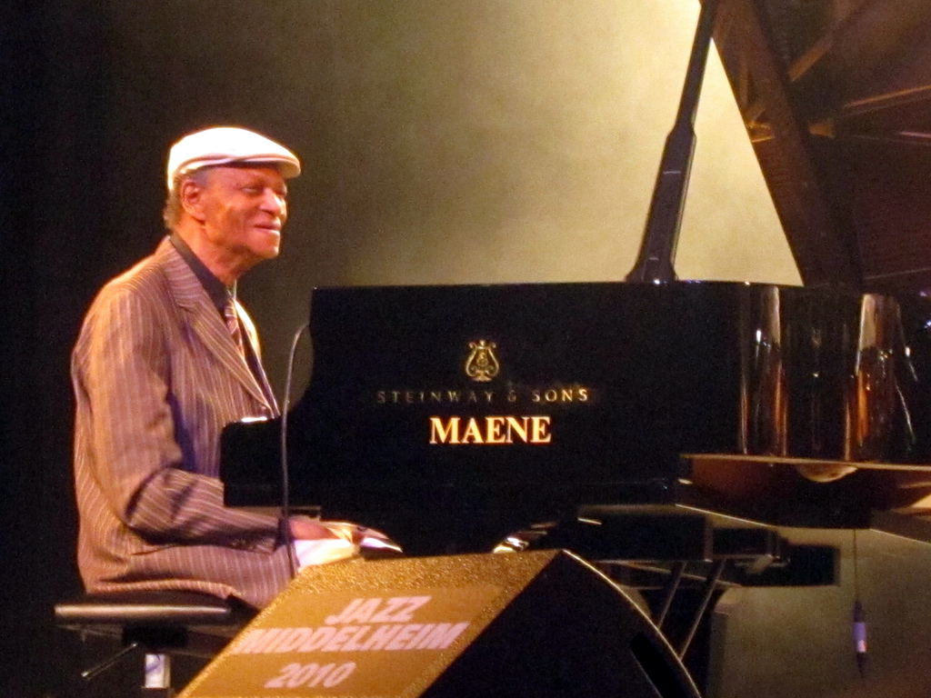 McCoy Tyner, Jazz Middelheim.